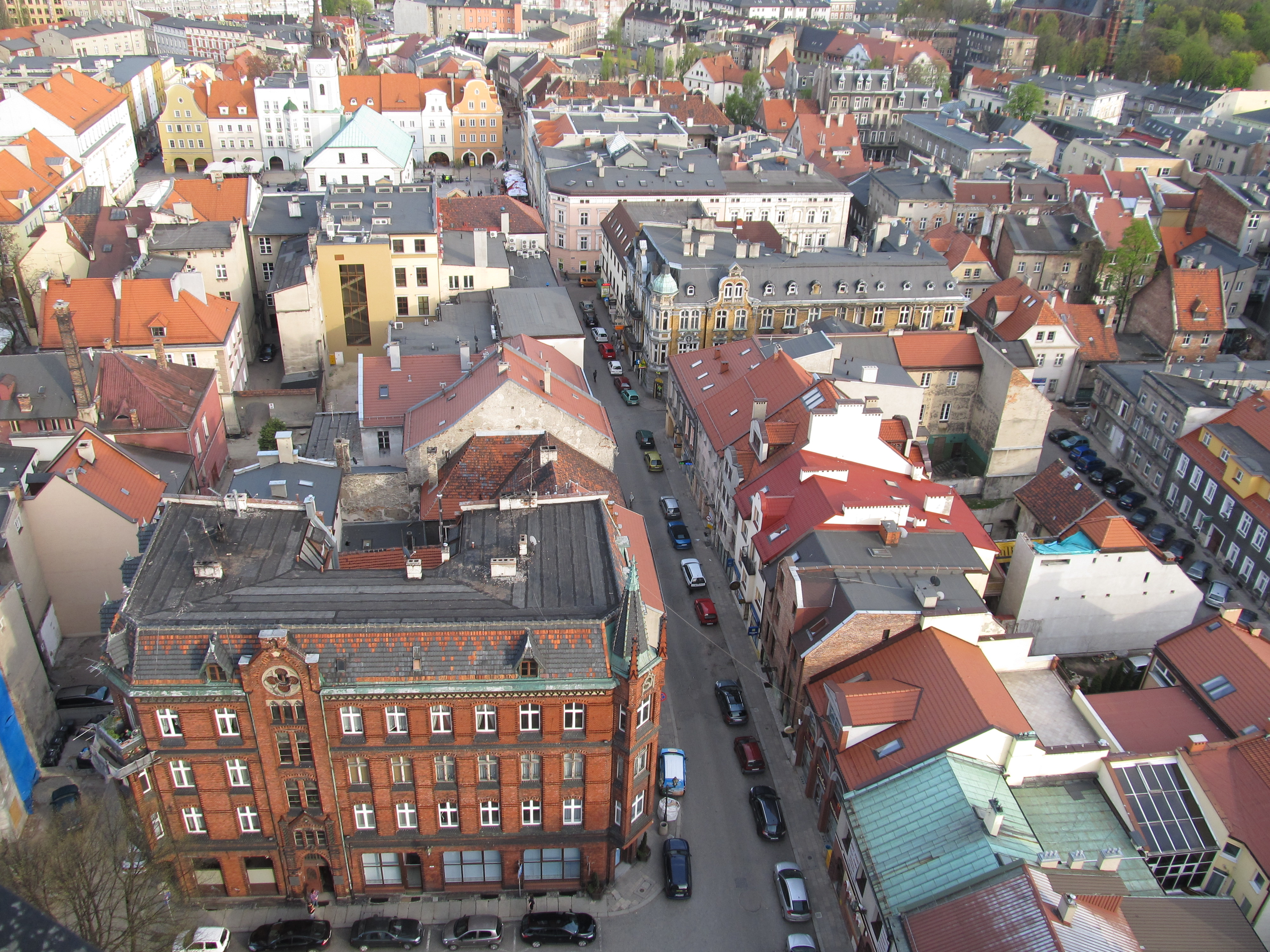 Miasto w ramach średniowiecznego założenia zamkniętego pierścieniem ulic: Górnych i Dolnych Wałów Gliwice, Gliwice